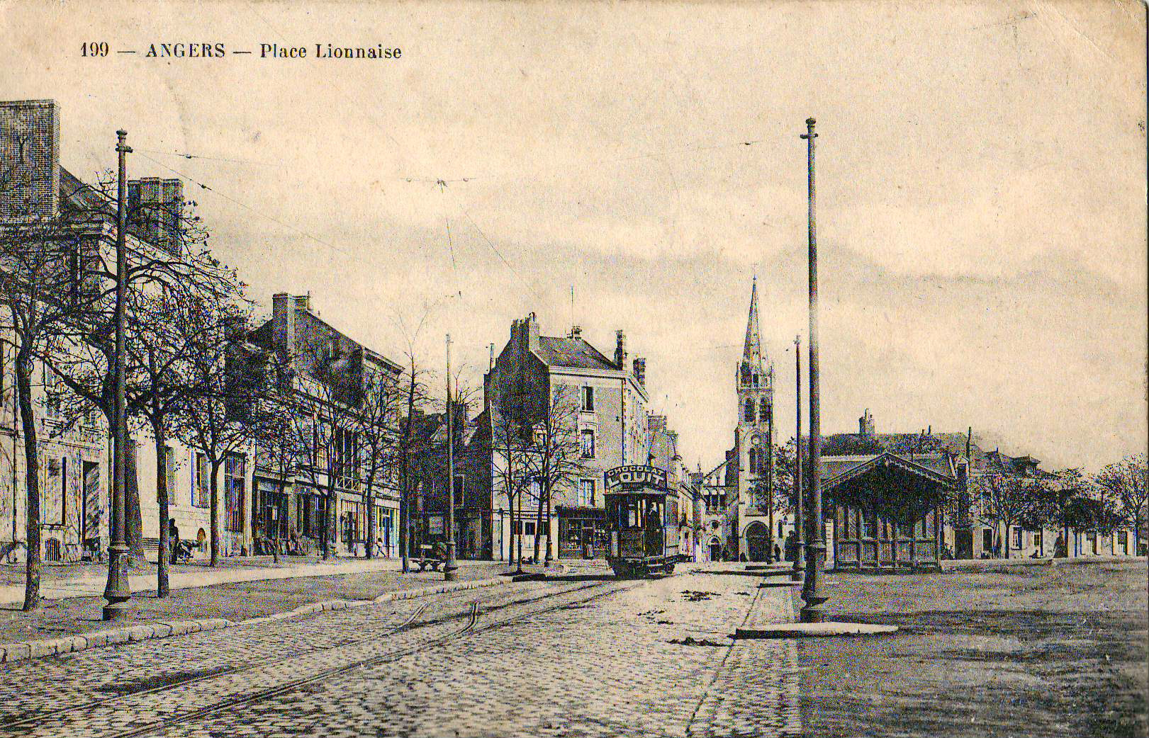 Carte postale ancienne sans mention d'éditeur, n°199 : ANGERS - Place Lionnaise